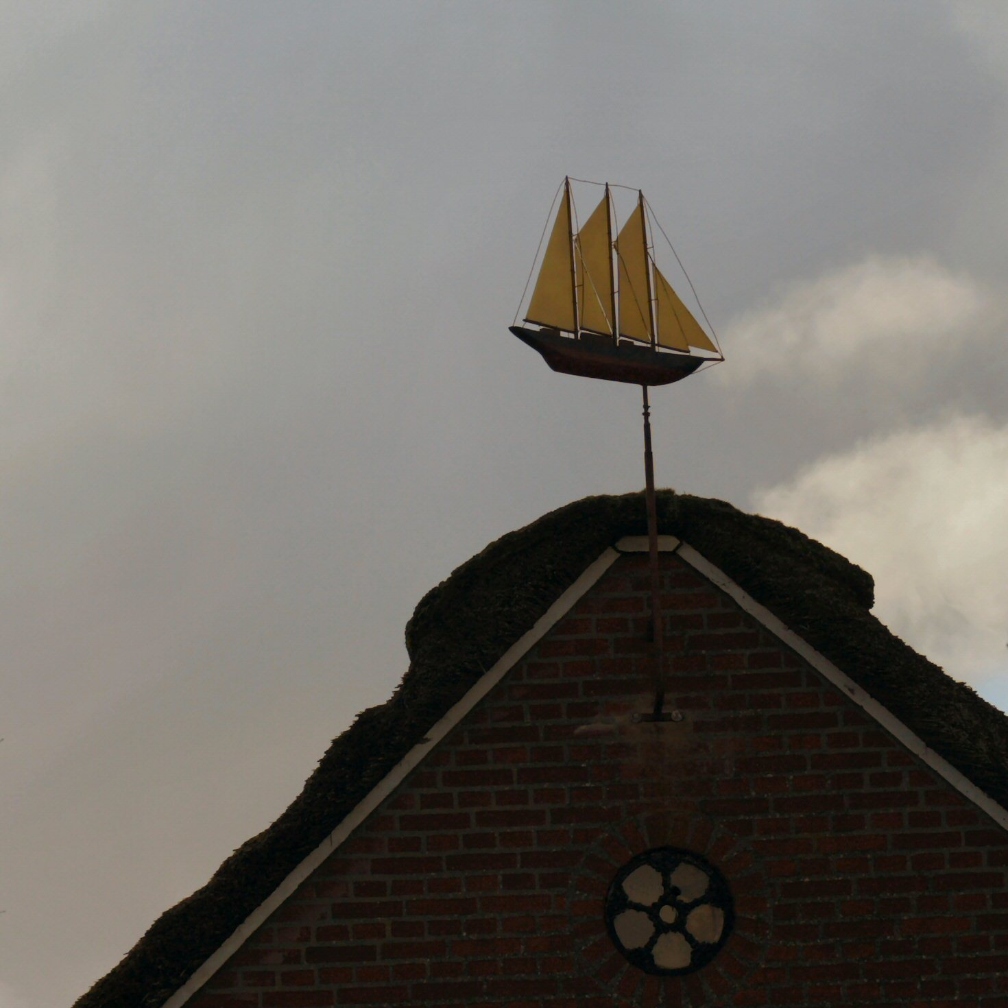 vindfløj som skib på Fanø